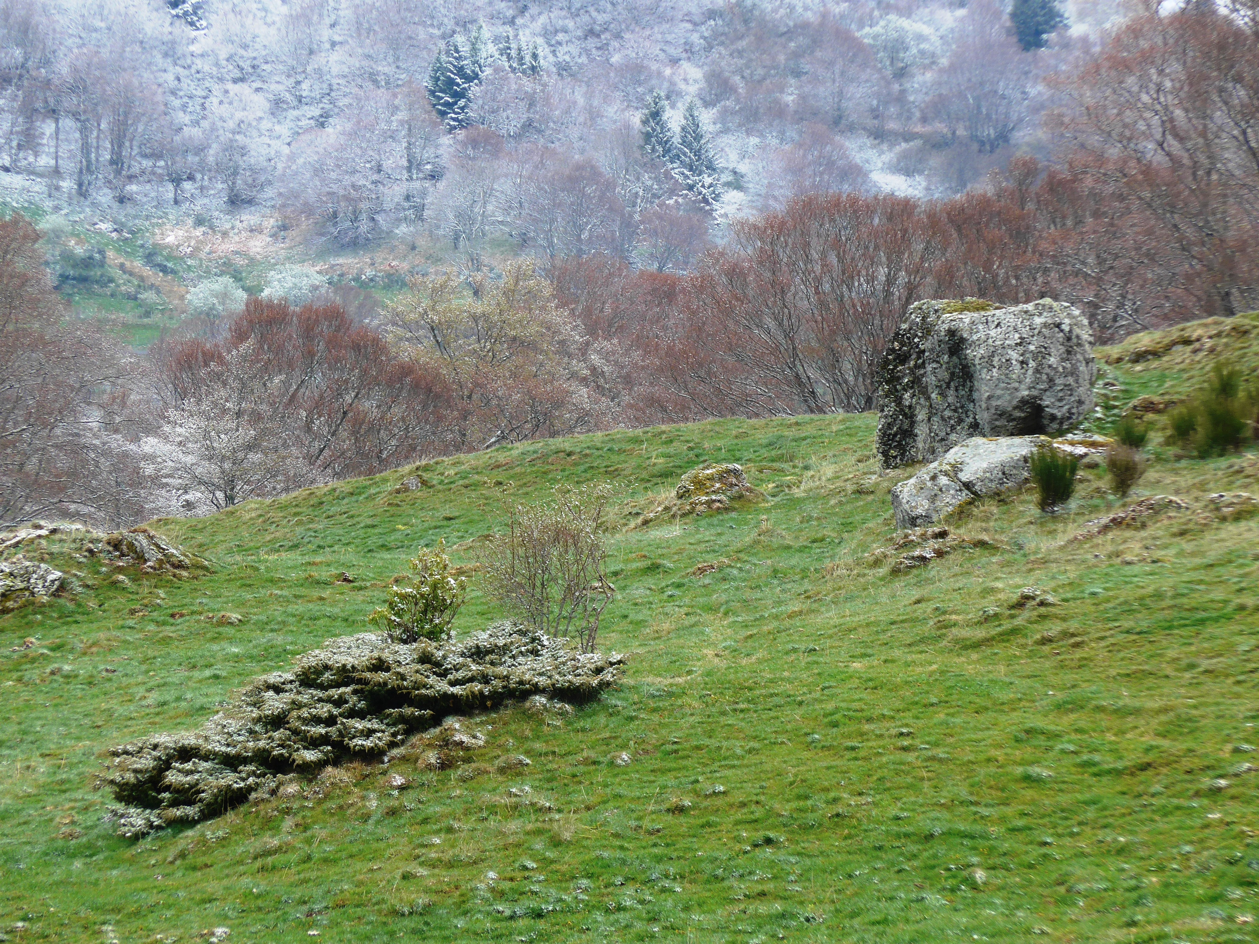 bombes volcanique